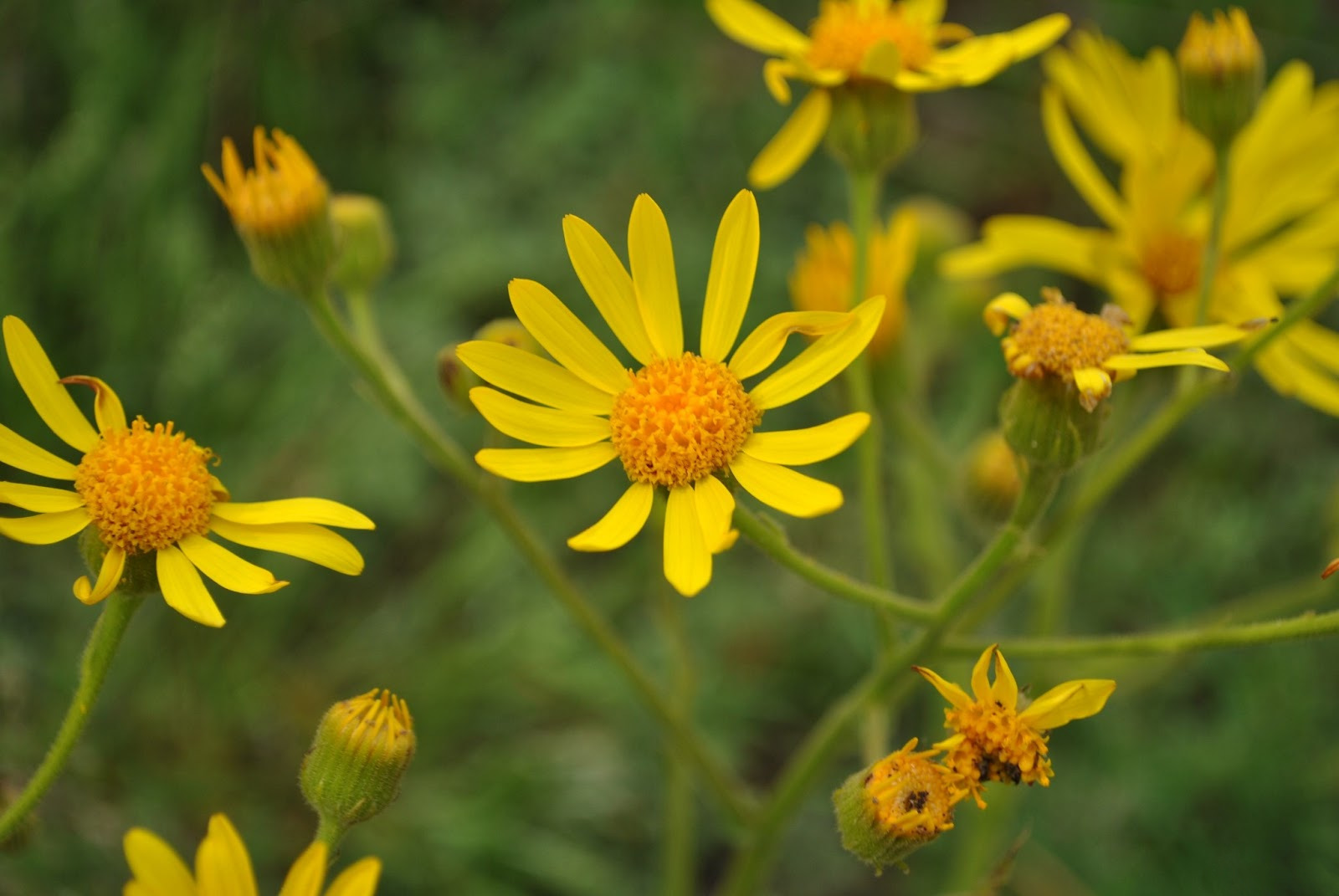 Senecio oxyphyllus. Asteraceae. Fotos tomadas en suelo pedregoso húmedo en zanja al margen de monte de Eucalyptus recién implantado en Villa del Carmen, departamento de Durazno, Uruguay.